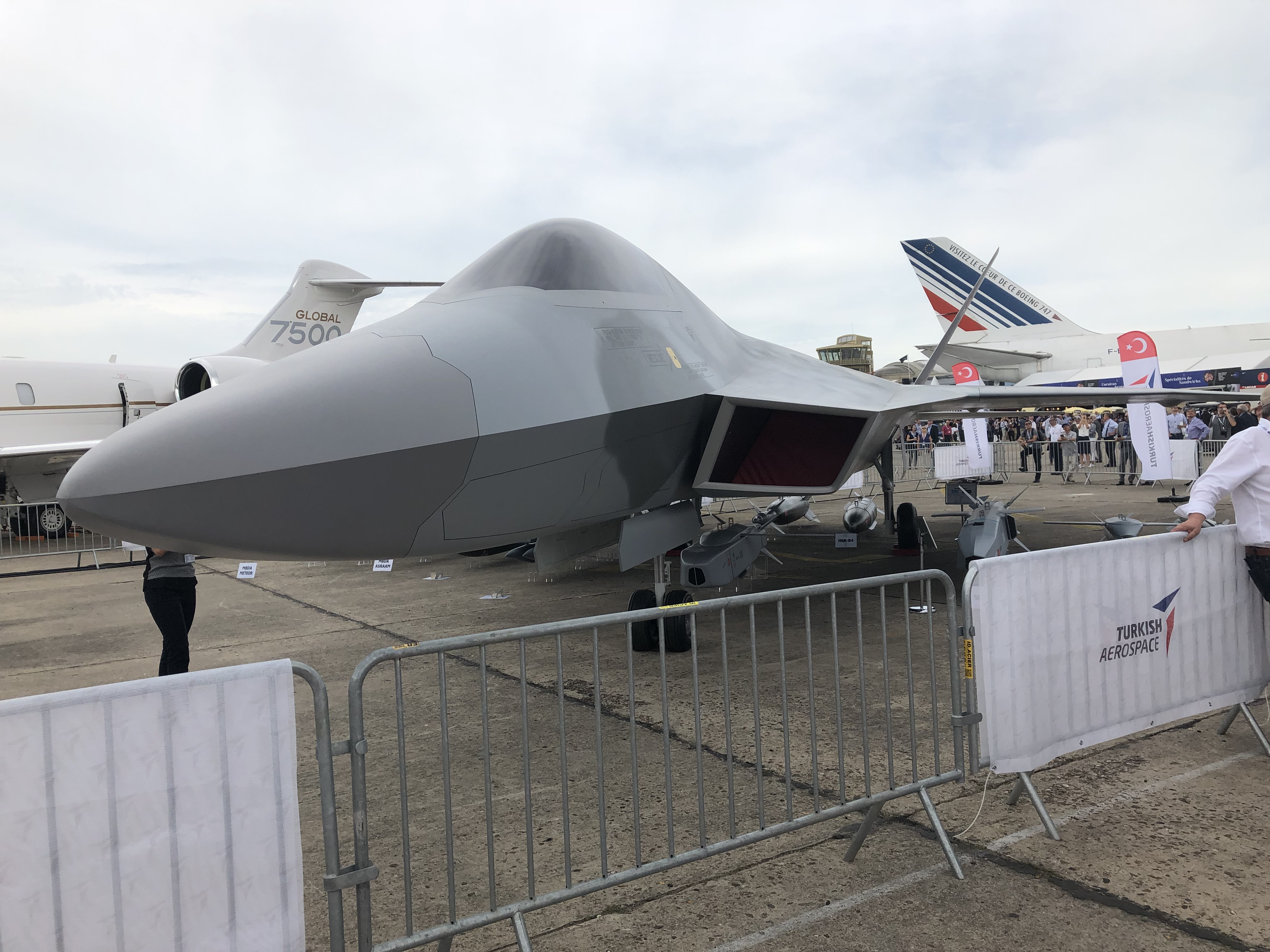 Maquette du TF-X de Turkish Aerospace Industries